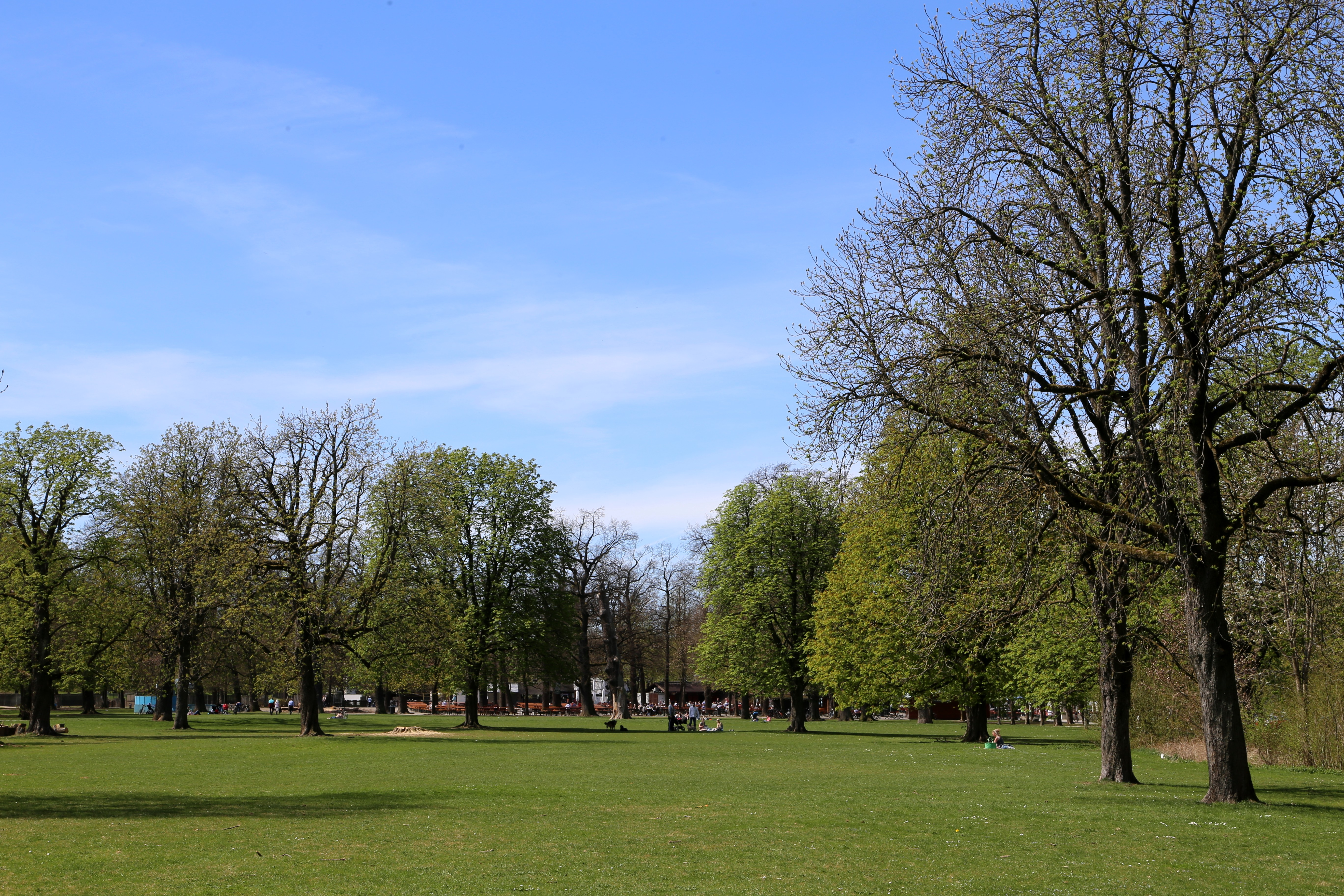 Frühling im Hirschgarten, München